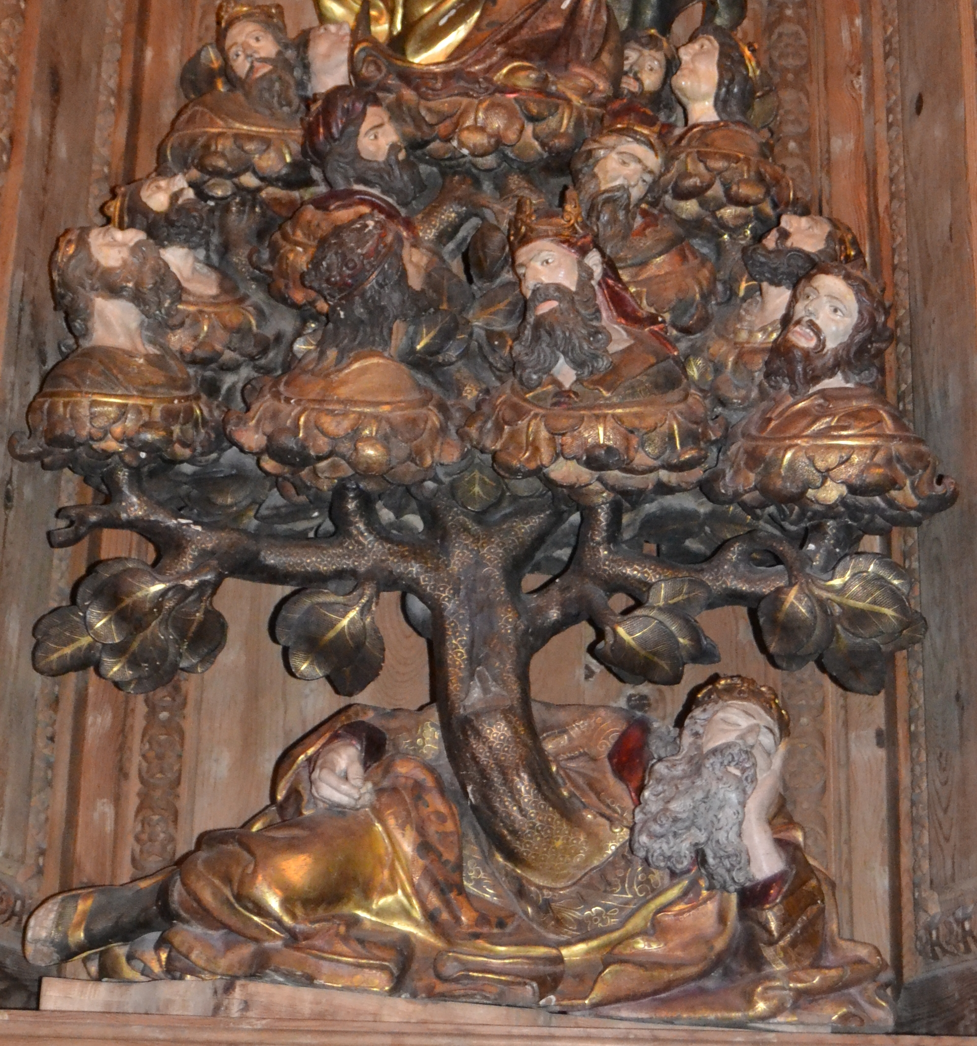 Escultura representando el sueño de Jessé del retablo de la Purísima de Santa María de Verdú.